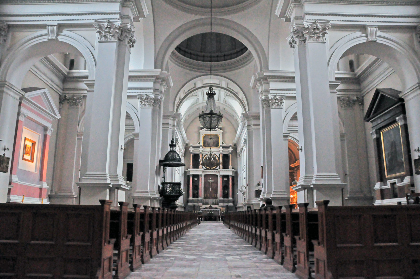 Warszawa - kościół p.w. Wszystkich Świętych